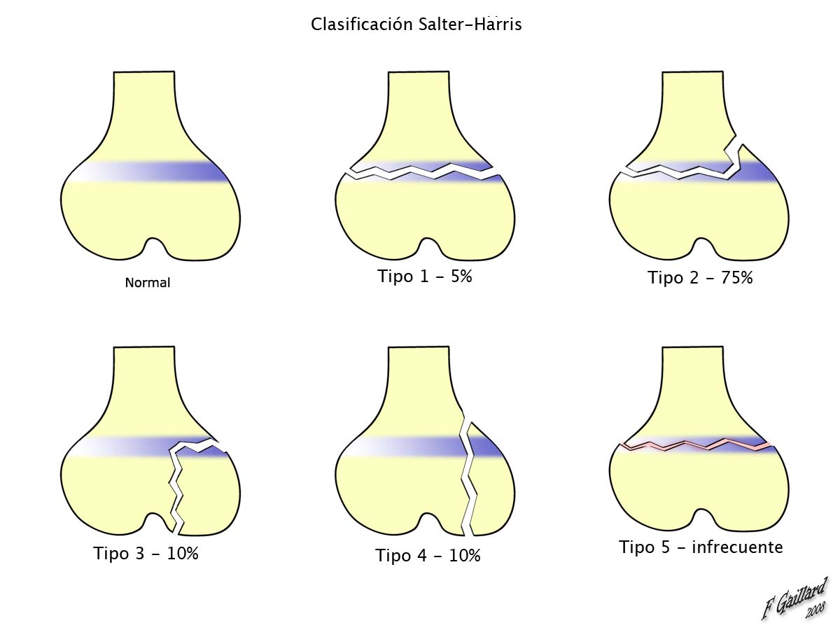 Representación de los grados de fractura de la placa de crecimiento o epifisiolisis.